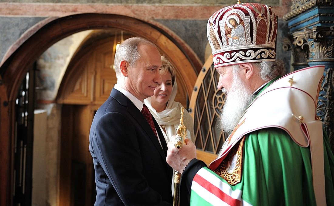 La Catedral de la Anunciación en el Kremlin de Moscú.